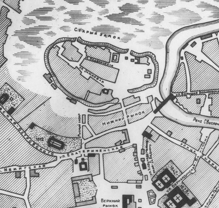 Замчышча на плане Мінска 1783 г.